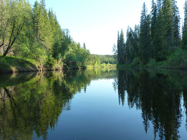 Верховья р. Мура: Чунский район, Иркутская область This image is related to the protected area of Russia number 3810452